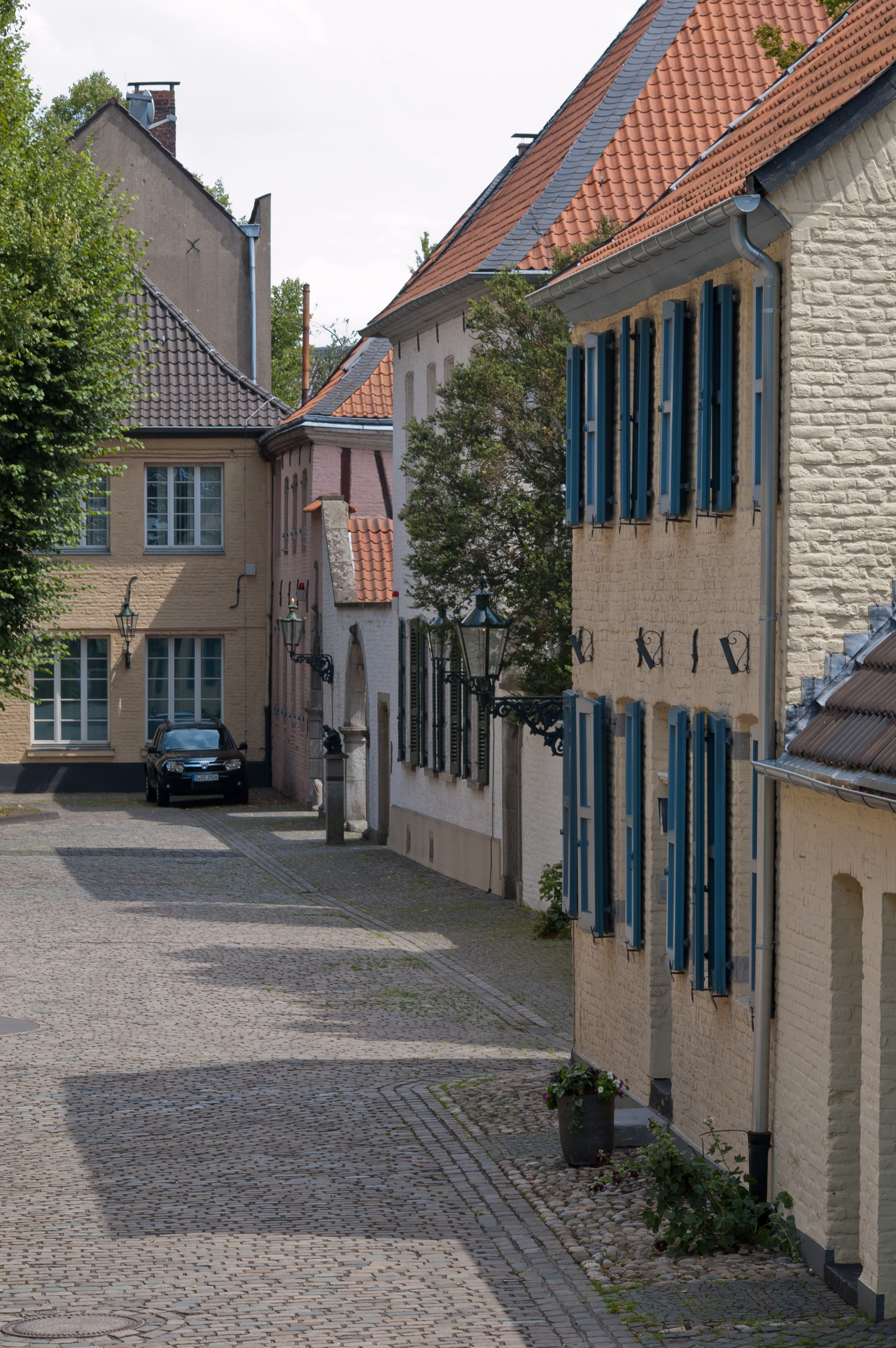 Hausfronten an der Südseite des Suitbertus-Stiftsplatzes in Düsseldorf-Kaiserwerth